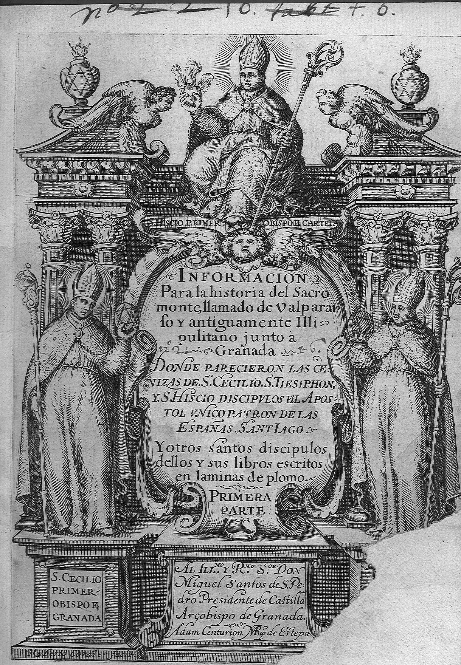 Portada calcográfica de Adán Centurión, marqués de Estepa: Información para la historia del Sacro monte, llamado de Valparaiso y antiguamente Illipulitano junto à Granada... Granada, 1632